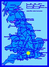 Silchester. Lec'hiadur